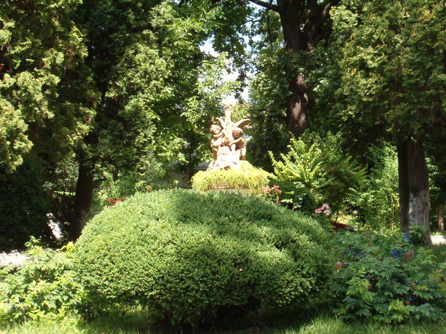 Cluj-Napoca, Institutul de Psihologie (str.Republicii nr.37)